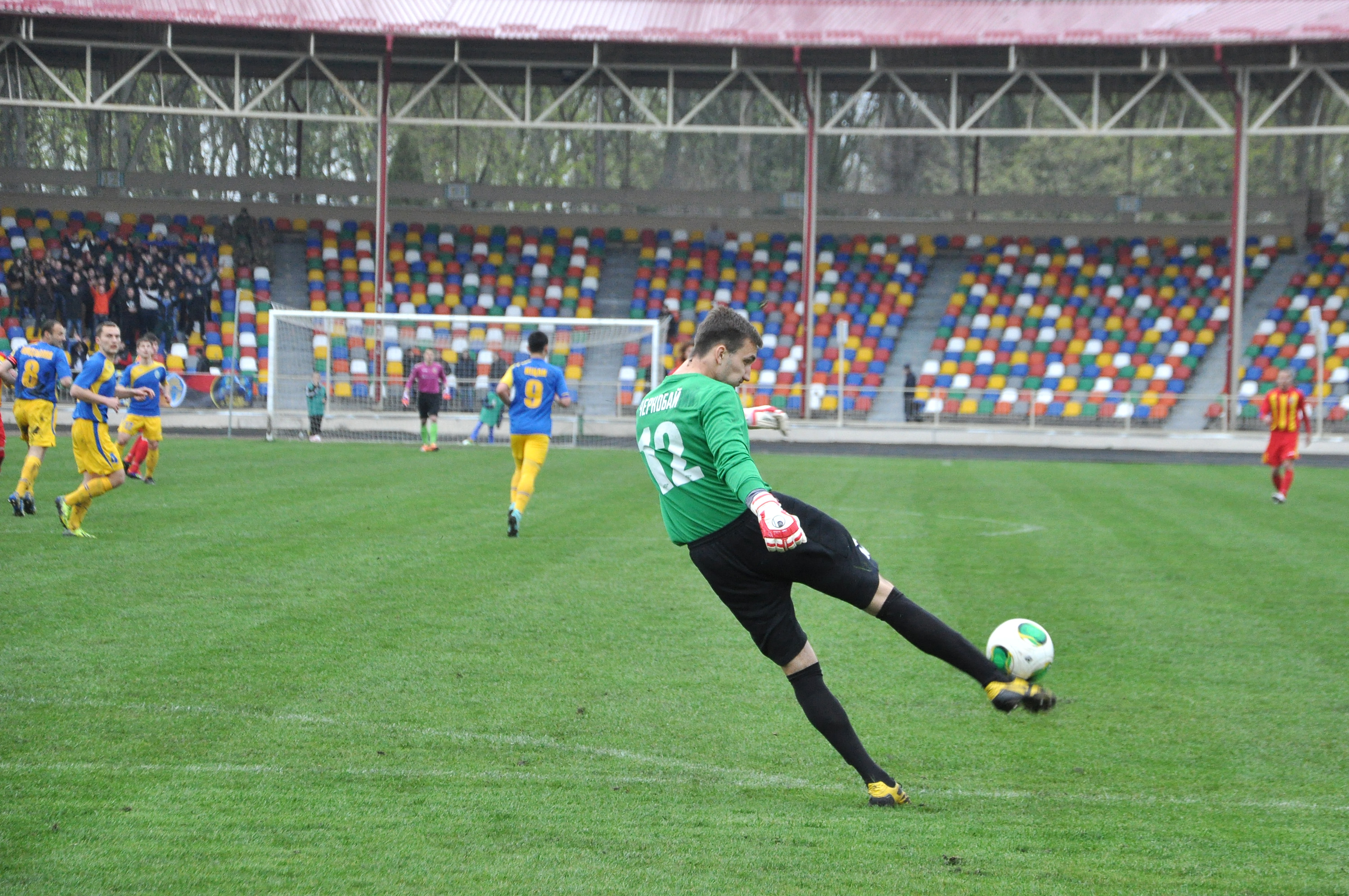 Матч 22-го туру чемпіонату України з футболу 2014—2015: перша ліга між ФК «Тернопіль» та ФК «Зірка» (Кіровоград) на тернопільському міському стадіоні 17 квітня 2015 року. На передньому плані — воротар ФК «Тернопіль» Сергій Чернобай.